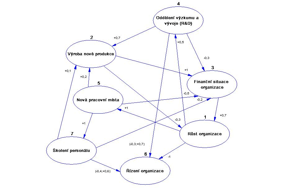 upravený obrázek z: autoři: Ю.Ф. Тельнов, А.П. Цыбин